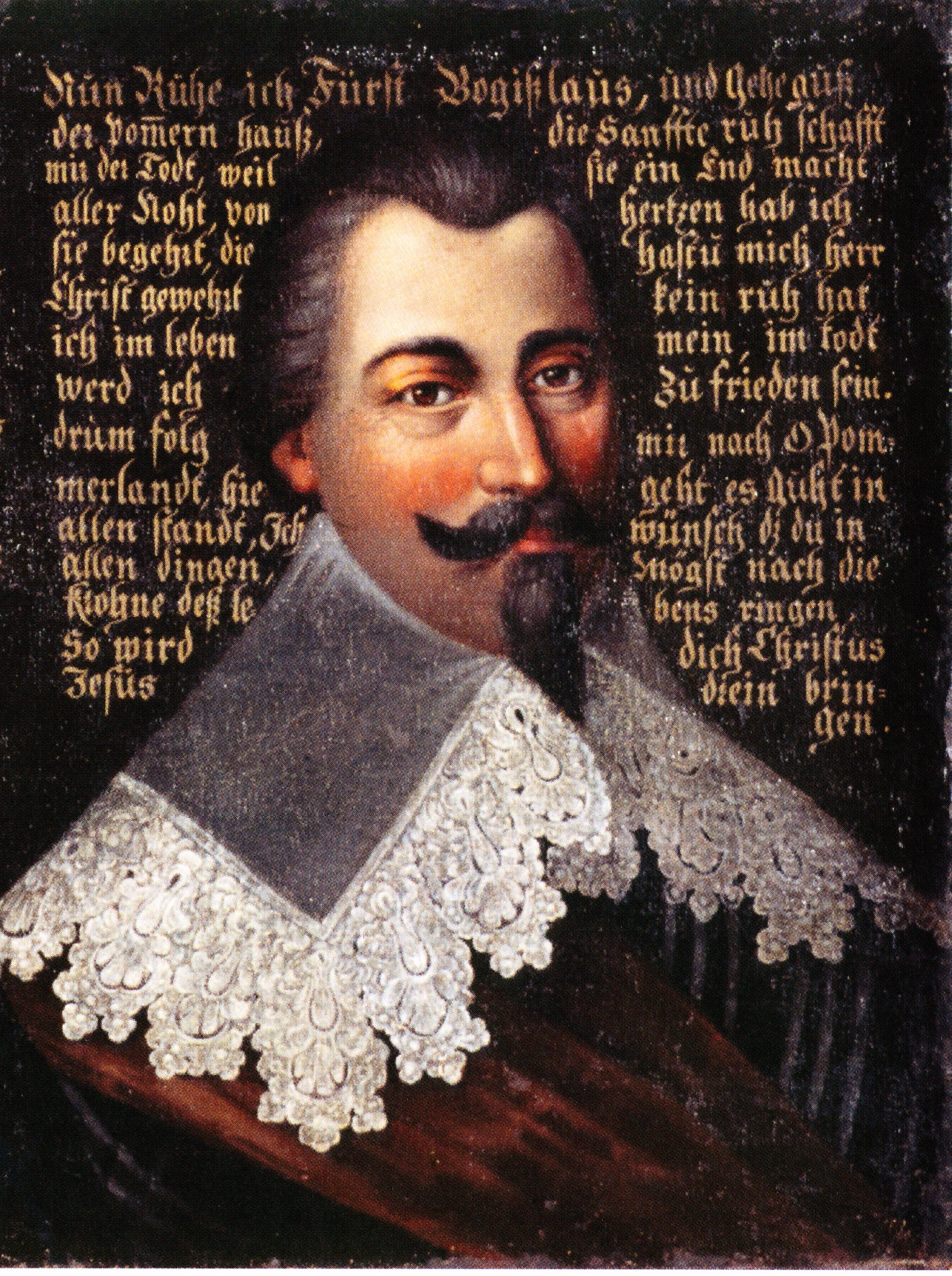 Ölgemälde von Herzog Bogislaw XIV. von Pommern, Teil des Doppelbildnisses mit König Gustav II. Adolf von Schweden